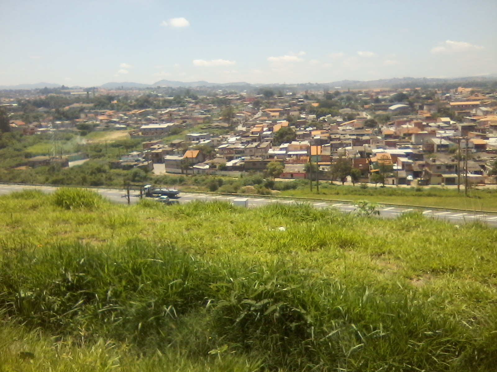 Avenida Ayrton Senna, no Município de Itaquaquecetuba, com vista para o bairro da Vila Japão.